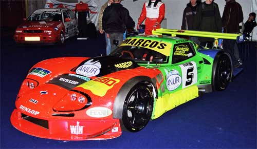 A Marcos Mantis GT delivers 506bhp.